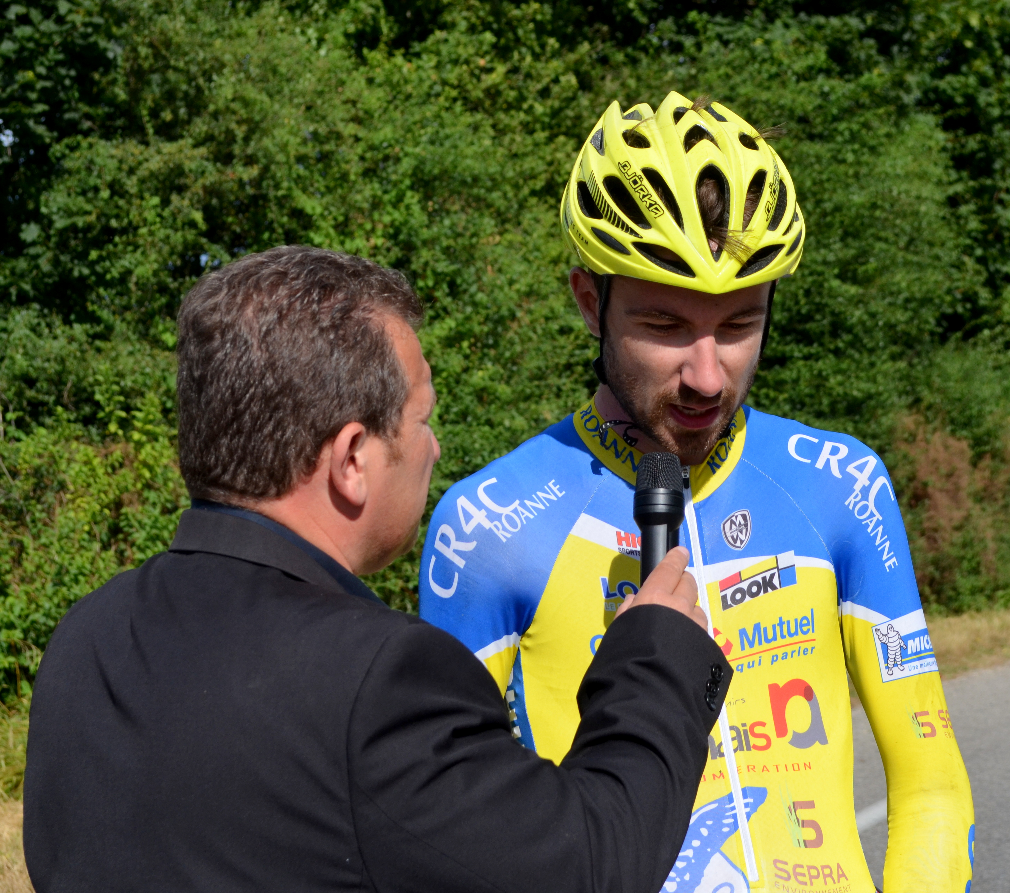 Grand Prix de Charvieu-Chavagneux 2016 : images de l'échauffement, de la course et de l'après-course : Clément Carisey, vainqueur.